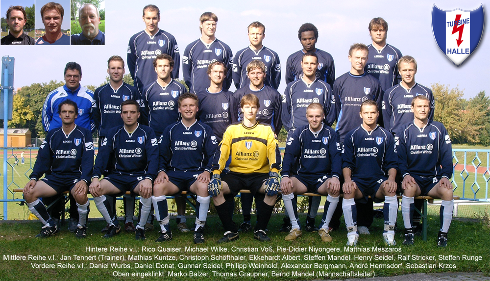 1.Mannschaft von Turbine Halle in der Saison 2008/09